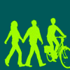 Zone cycliste et piétonne sur le parcours de la promenade verte de Bruxelles